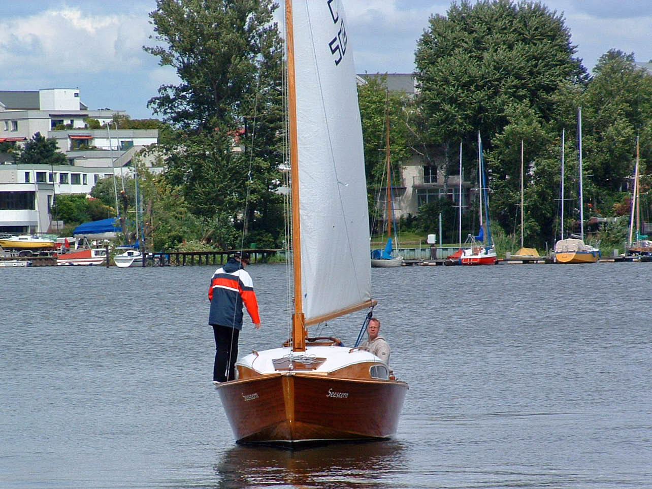 Knickspanter unter Segel (Seestern)